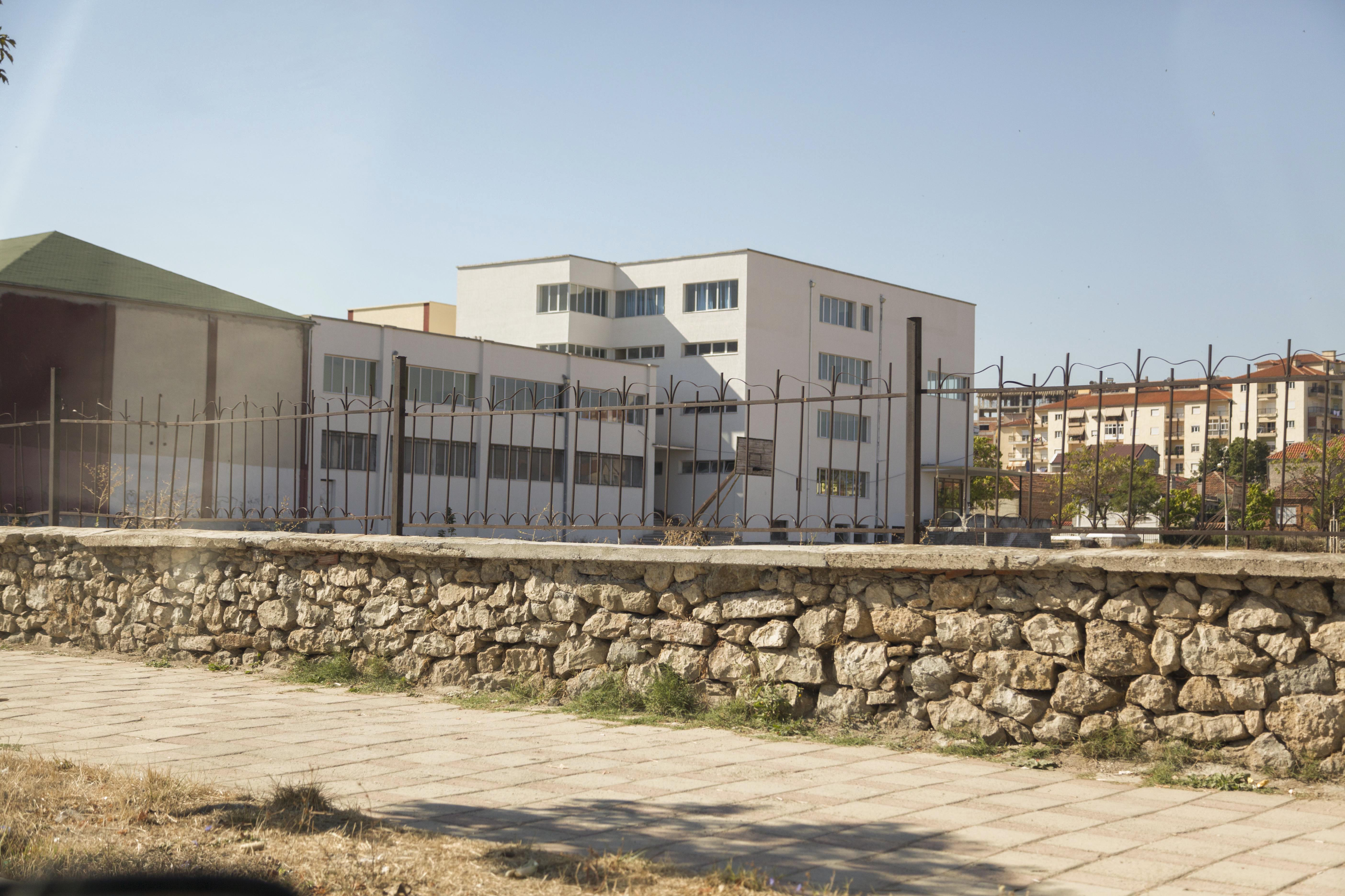 Raqi Qirinxhi (From Behind)